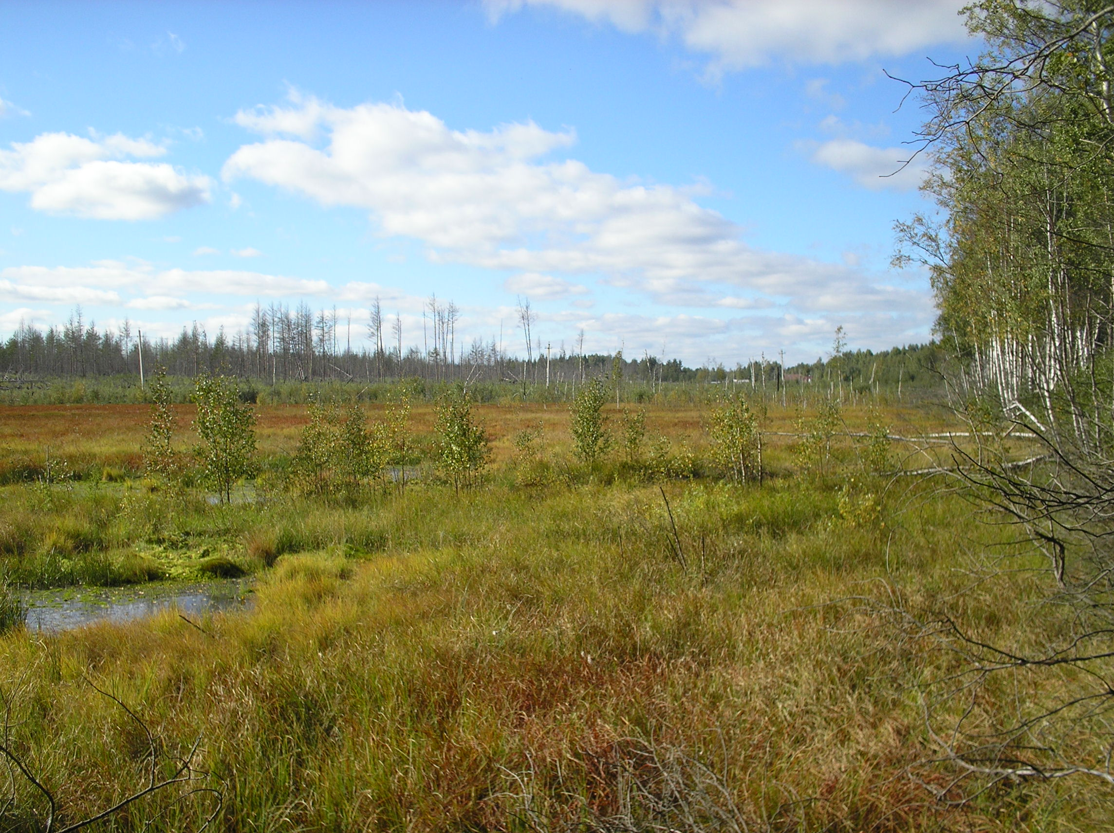 Болото